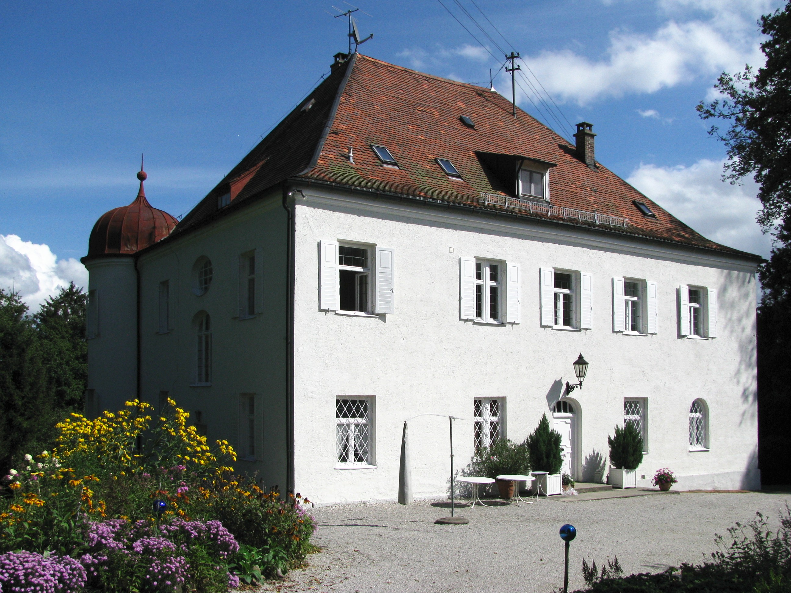 Schloss Beuerberg; Herrenhaus, Südwestansicht